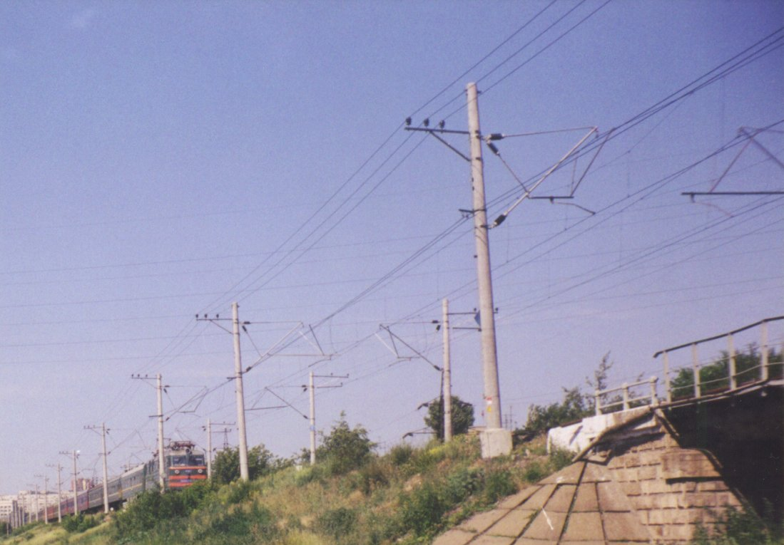 Fervoja trako kun supertraka kontakta linio en Volgograd, Rusio, 2003. De supertraka kontakta linio videblas la ĉefa drato, akcesora kablo, drataj pontetoj, izoliloj, flankaj detiriloj, konzoloj, fostoj. Mi, aŭtoro de la bildo, permesas al ĉiuj uzi ĝin kun ĉi tiuj kondiĉoj: La fonta bildo de ĉi tiu bildo estas ankaŭ en mia propra retpaĝaro [1]